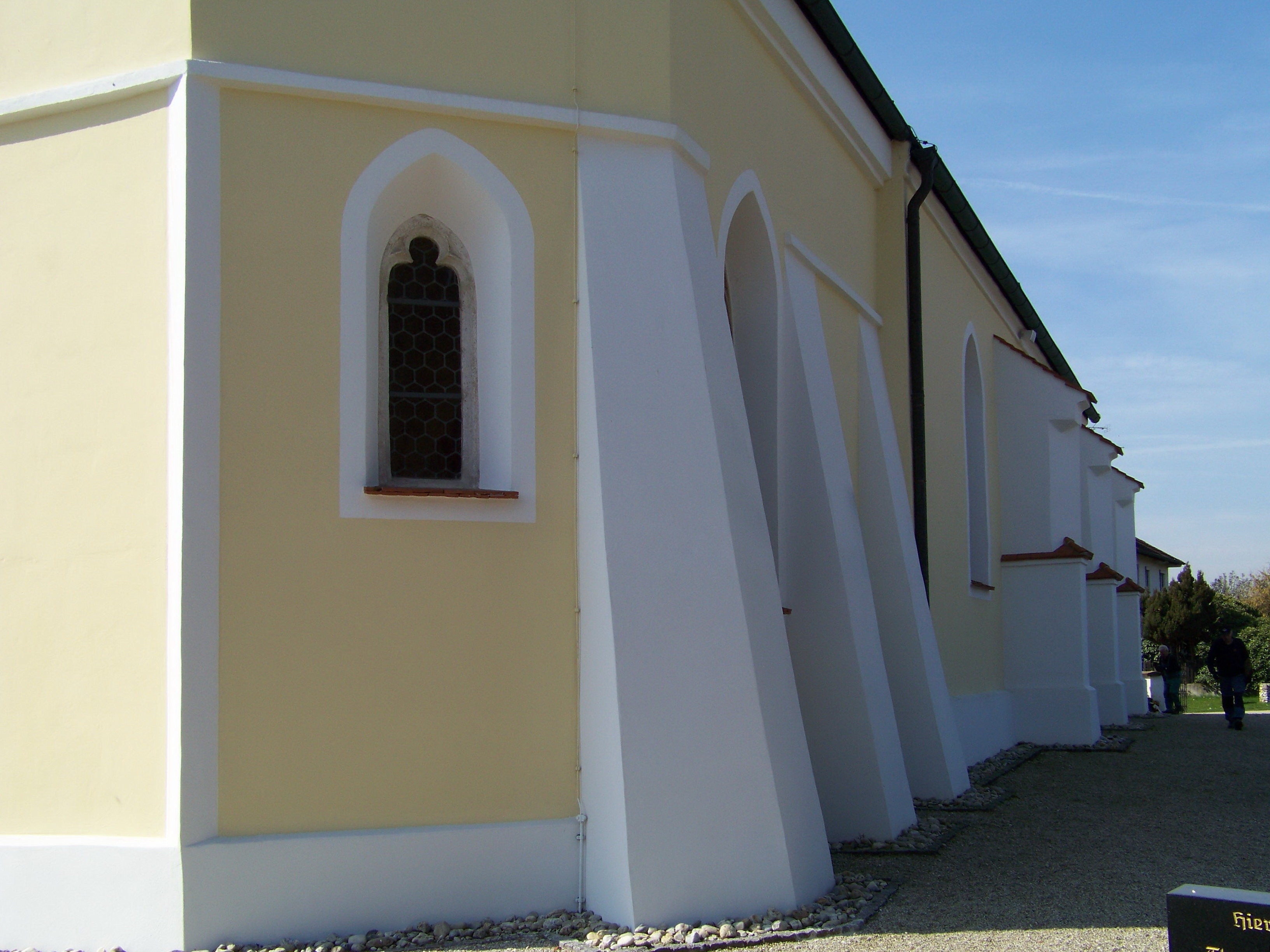 Oberneuhausen, Am Kirchberg 5. Filialkirche St. Peter und Paul. Saalkirche, Langhaus romanisch, Chor spätgotisch aus der zweiten Hälfte des 15. Jahrhunderts. Strebepfeiler und Putzgliederung.